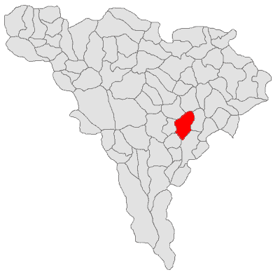 Categorie:Hărţi ale judeţului Alba